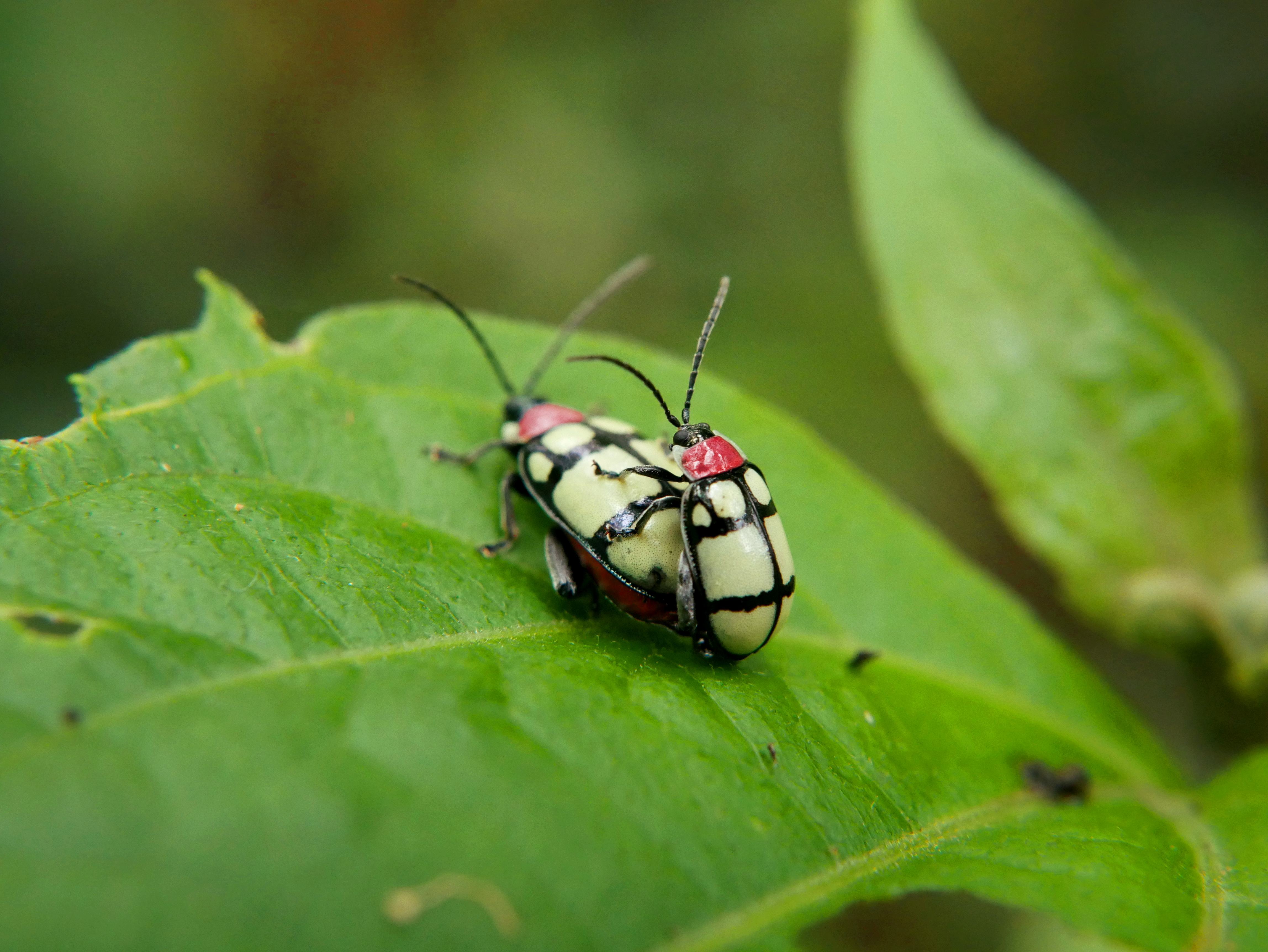 Português do Brasil: Besouros (Coleoptera) copulando.